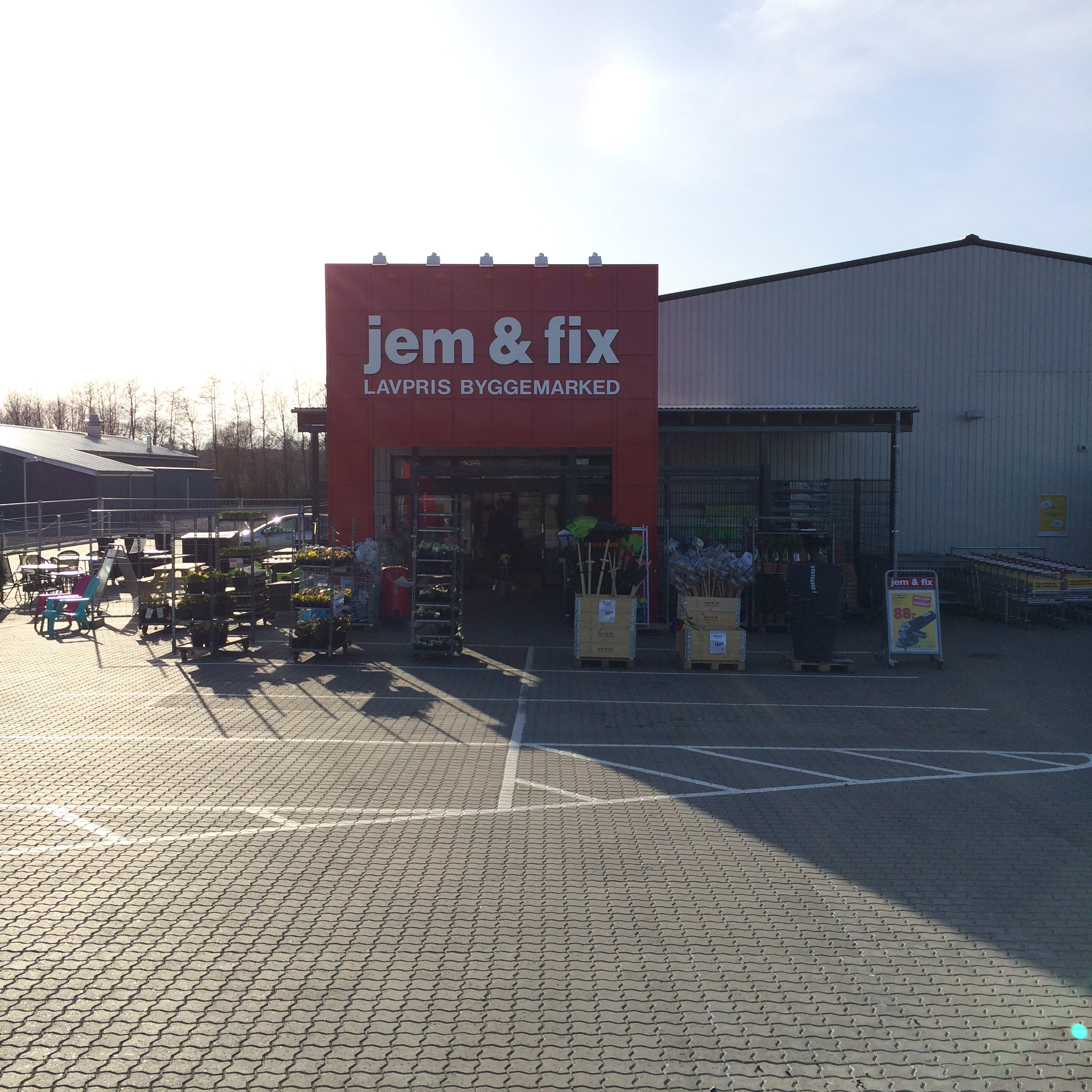 Jem & fix i Hadsund.